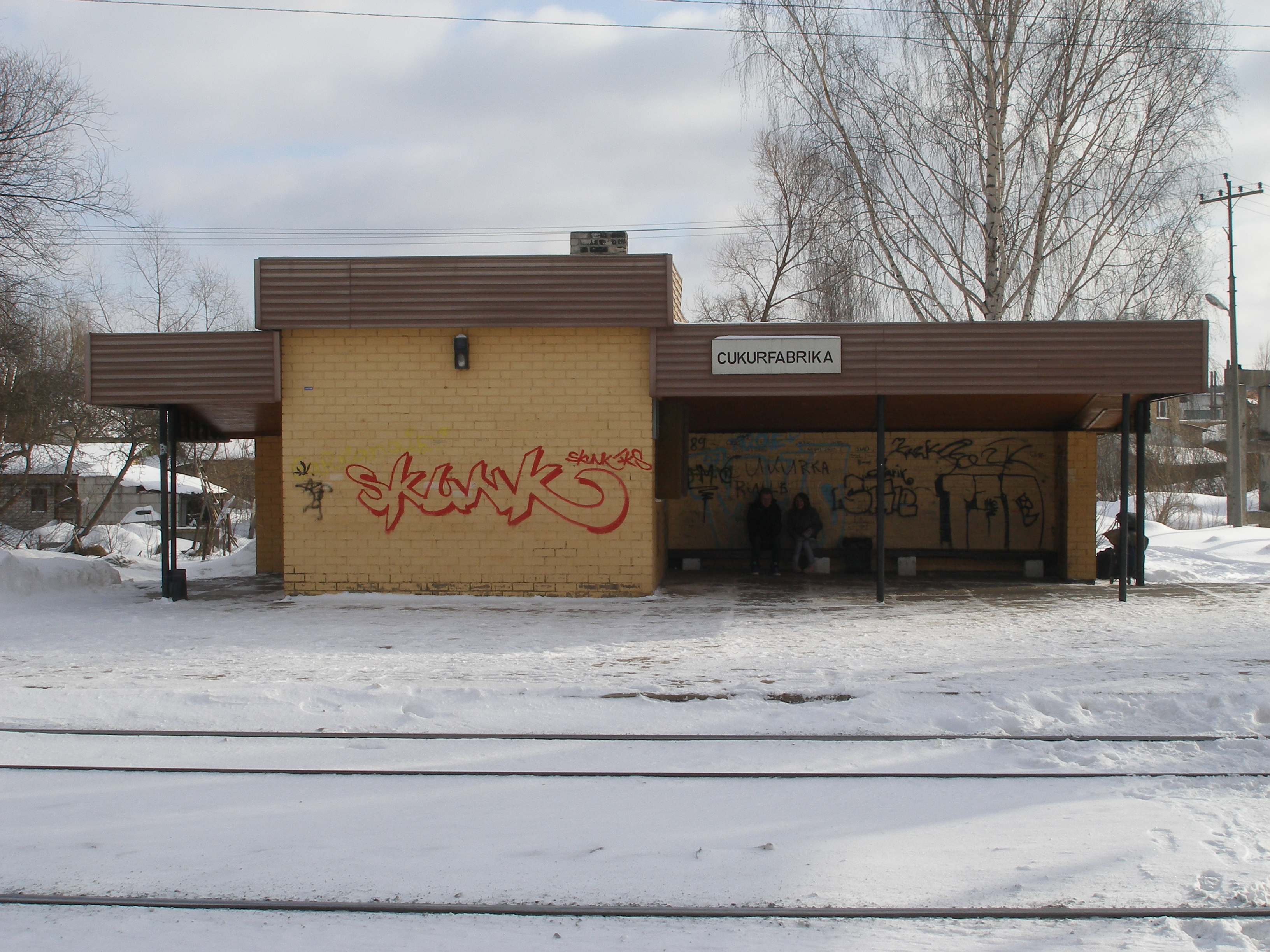 Пассажирский павильон остановочного пункта Цукурфабрика